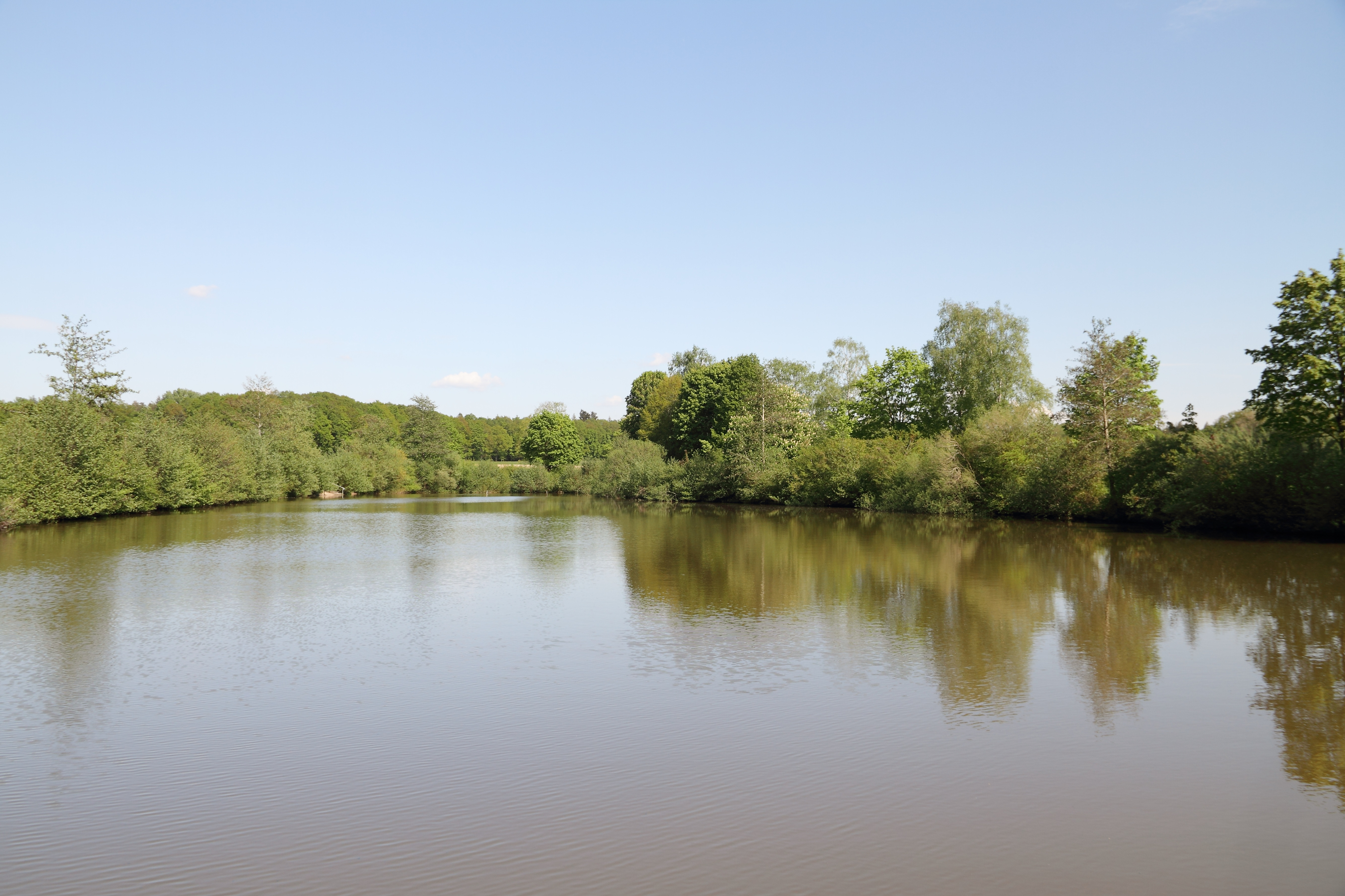 Der unter Naturschutz stehende Weiher Karrod im Creglinger Ortsteil Schonach. SGNr. 81280200042.